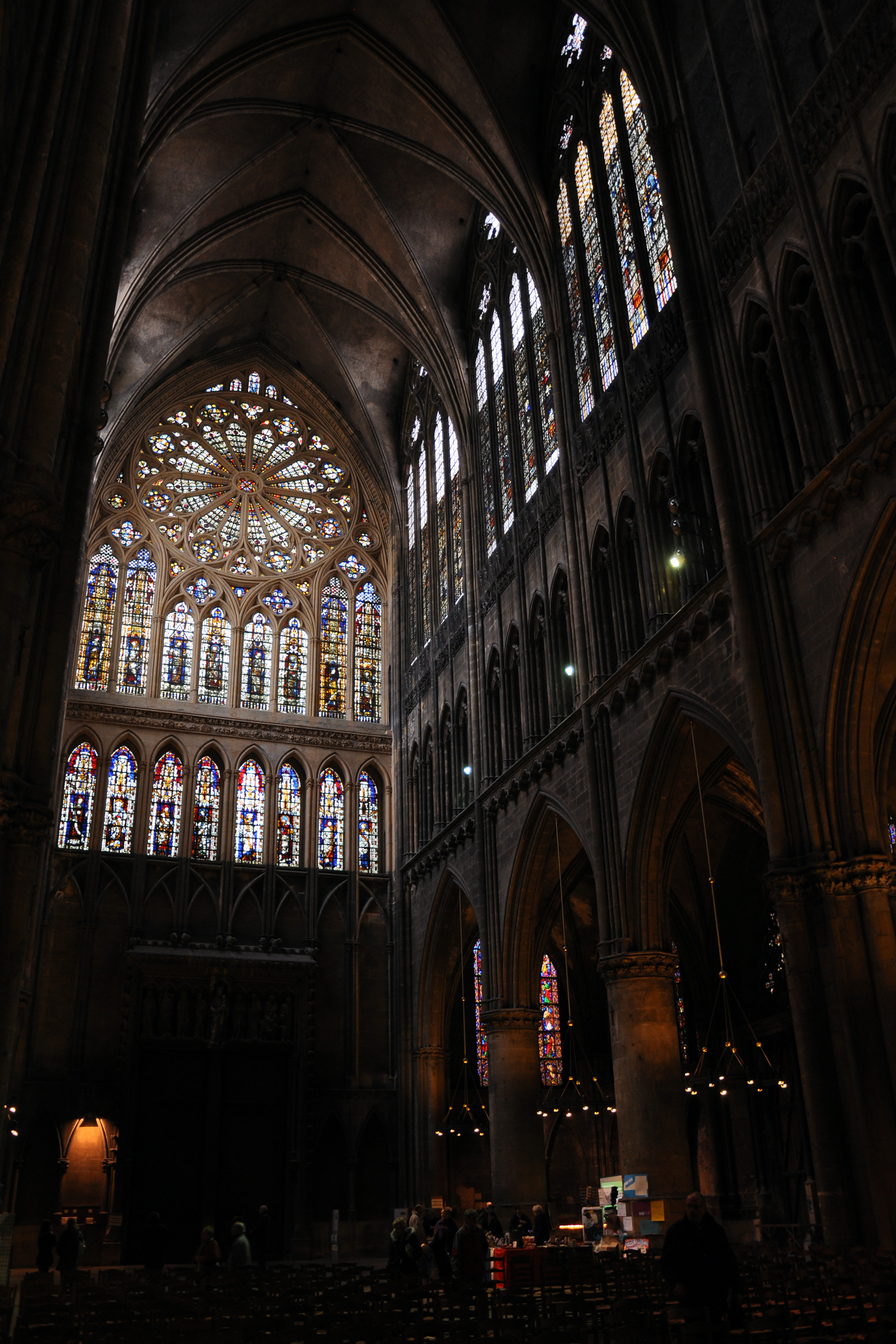 Intérieur de la cathédrale Saint-Etienne de Metz: la nef et le revers de façade avec la rose Ouest.